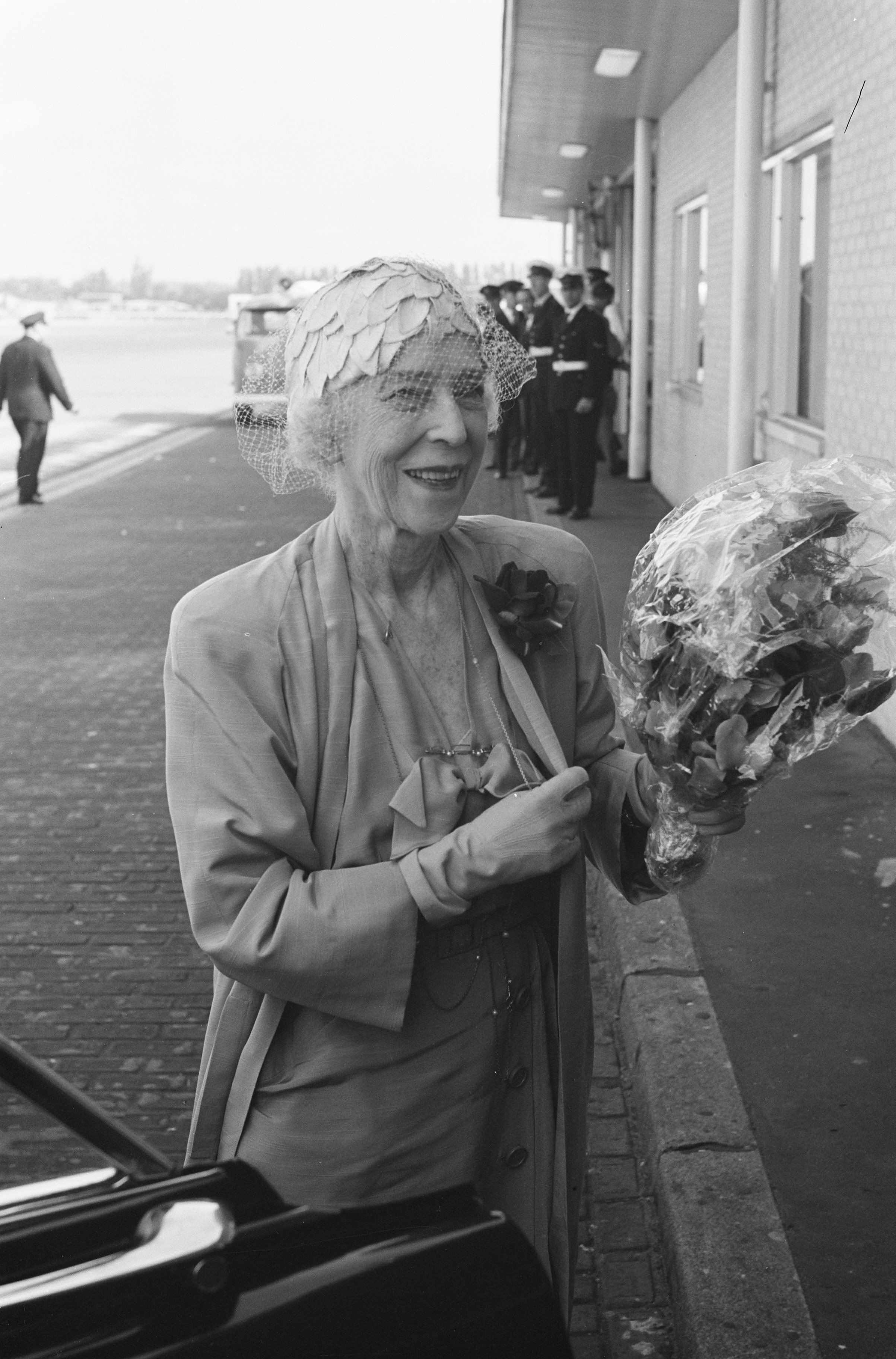 Collectie / Archief : Fotocollectie Anefo Reportage / Serie : [ onbekend ] Beschrijving : Kon. moeder Elisabeth van Belgie vertrekt naar Peking. Met bloemen Datum : 21 september 1961 Locatie : Peking Trefwoorden : BLOEMEN Persoonsnaam : Elisabeth van Belgie Fotograaf : Pot, Harry / Anefo Auteursrechthebbende : Nationaal Archief Materiaalsoort : Negatief (zwart/wit) Nummer archiefinventaris : bekijk toegang 2.24.01.05 Bestanddeelnummer : 912-9583